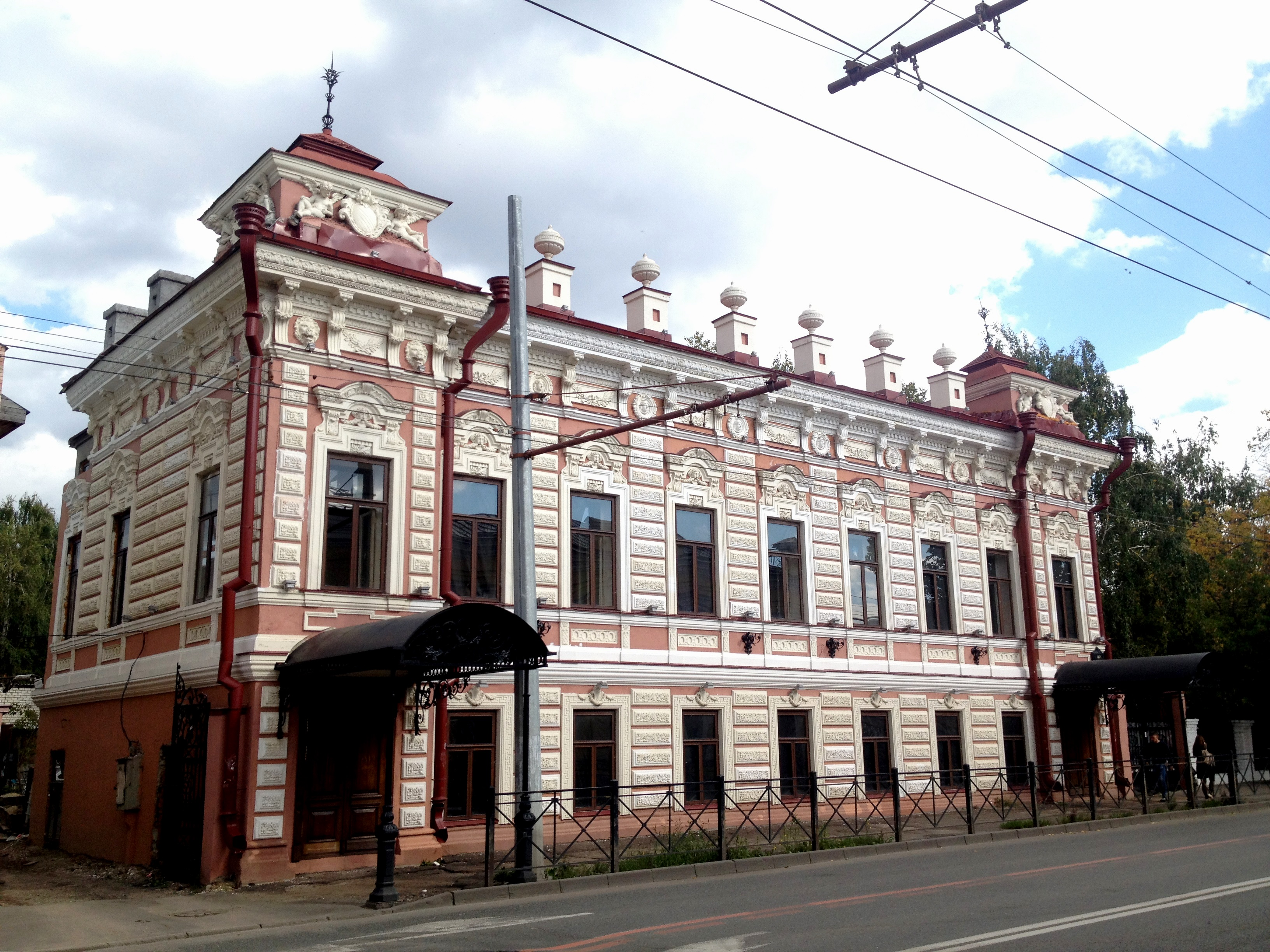 Дом, в котором был создан мусульманский социалистический комитет, где работал революционер Мулланур Вахитов: улица Кирова, 37, Казань, Татарстан